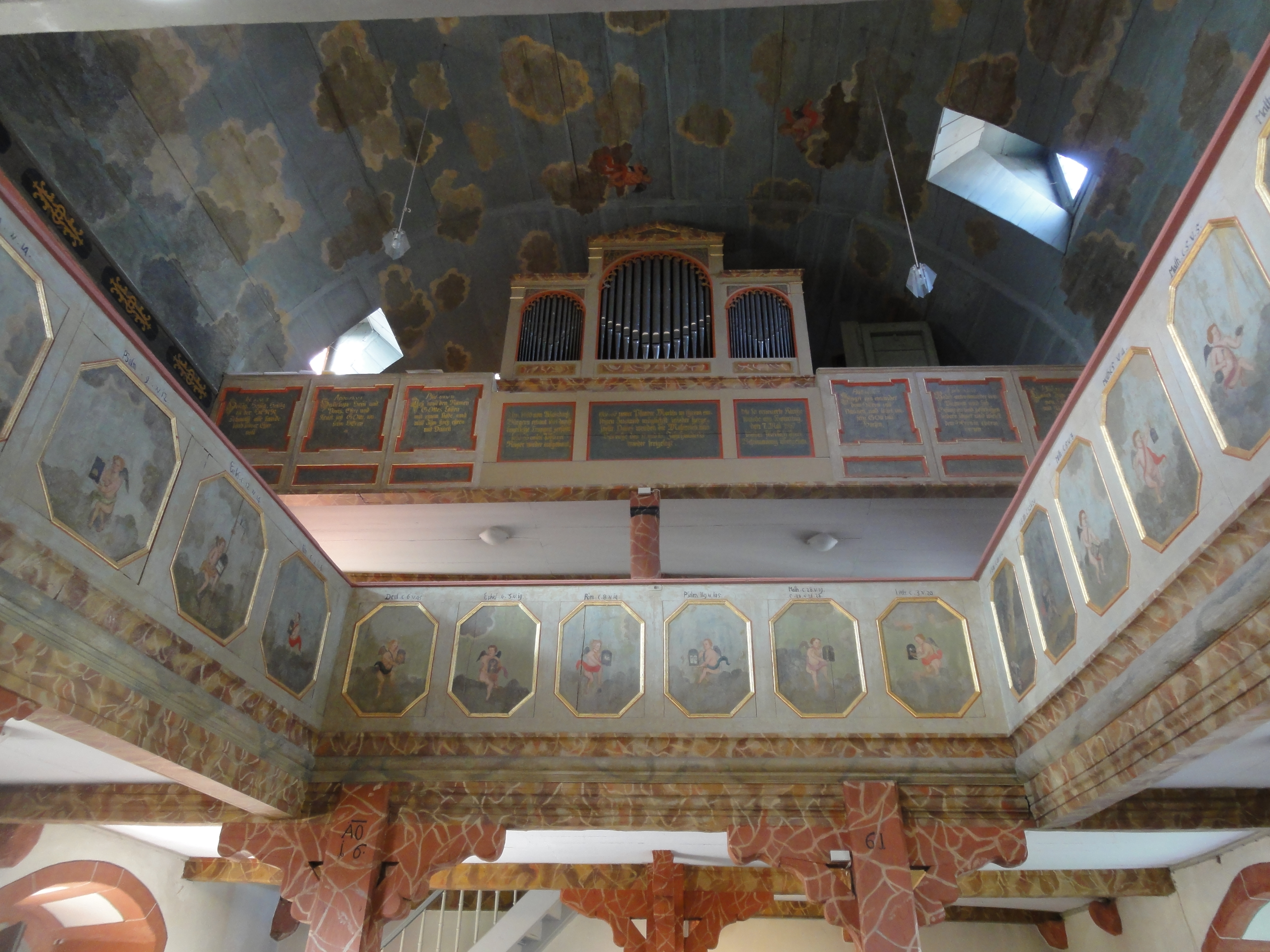 Innenansicht mit Decke und Orgel der Kirche in Idstein Walsdorf